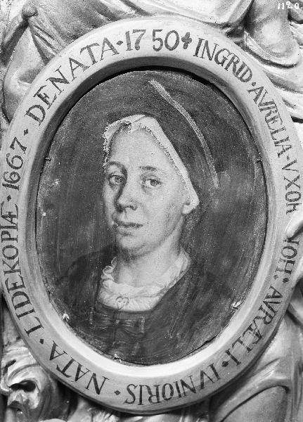 Epitafium, Aureller den äldre och den yngre, upprättat 1723, detalj, porträttmedaljong. Kategori: (09) EpitafierEpitafium, Aureller den äldre och den yngre, upprättat 1723, detalj, porträttmedaljong.